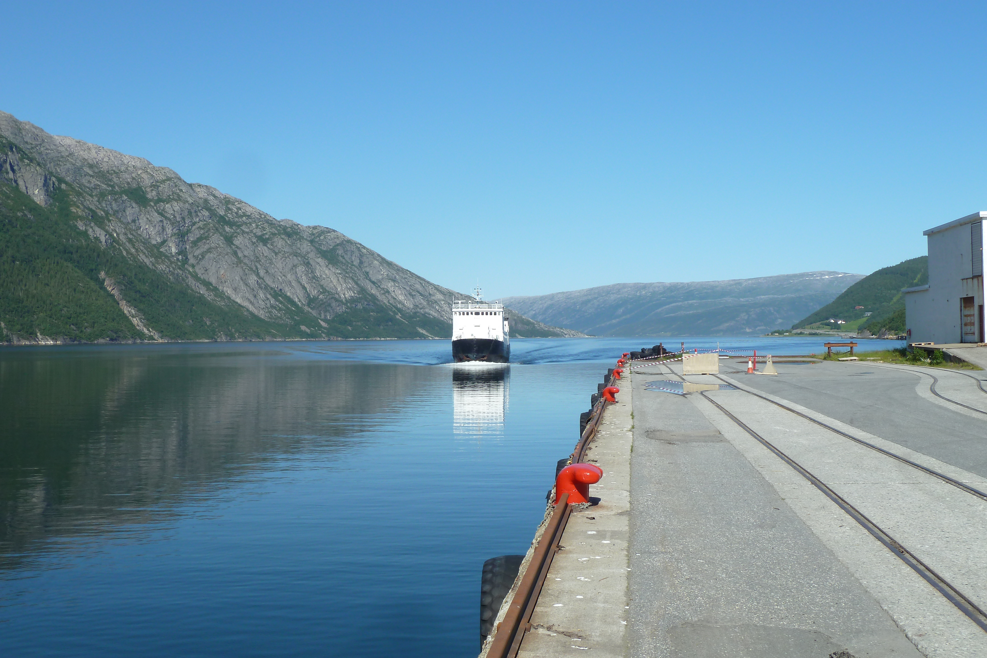 MS Rana på vei inn til Mosjøen fergekai.